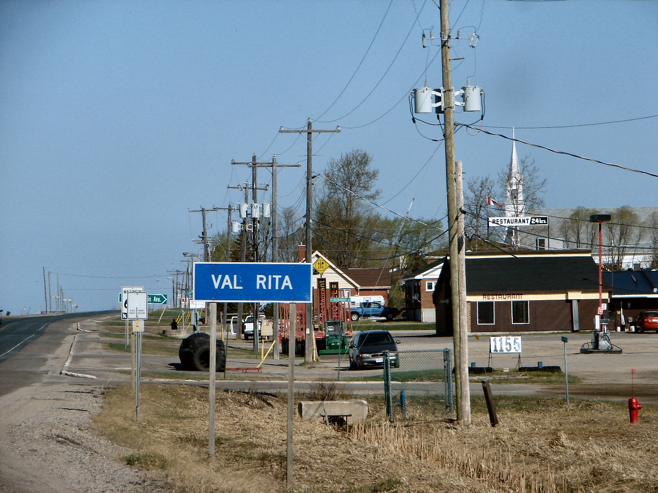 Val Rita, Ontario, Canada